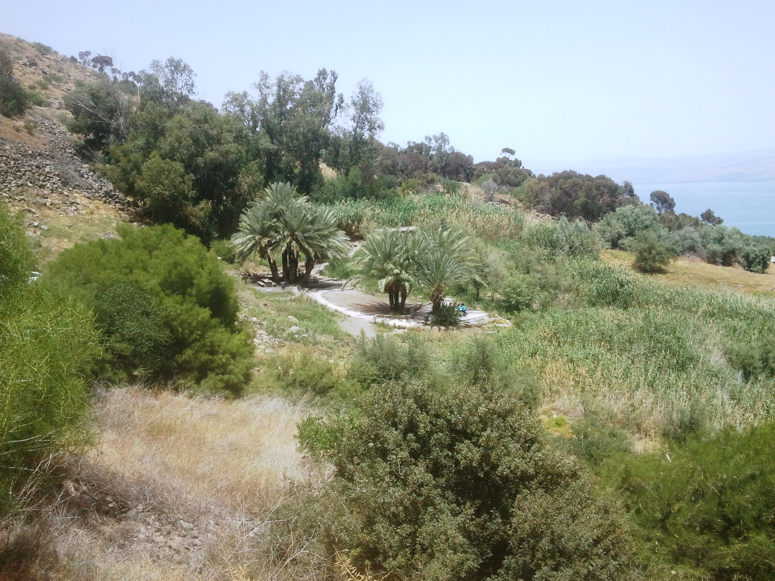 עין פוריה הוא מעיין ברכס פוריה מעל מושבת כנרת. המעיין שוכן בקרבת מקום בו התיישבה בשנות ה-20 של המאה ה-20 קבוצת הר-כנרת.